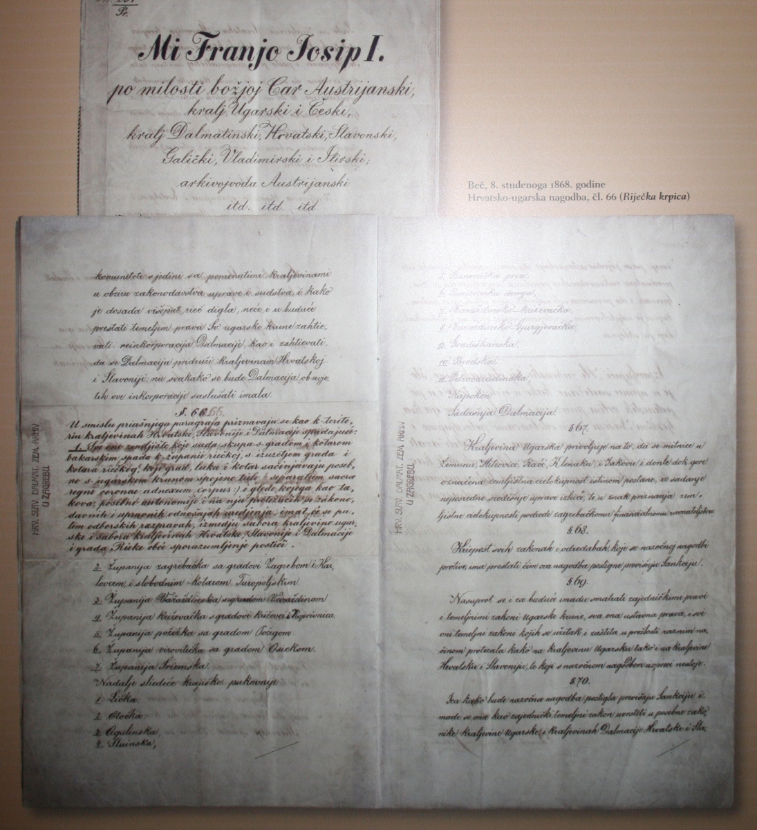 snimljeno tijekom Noći muzeja u Hrvatskom državnom Arhivu u Zagrebu